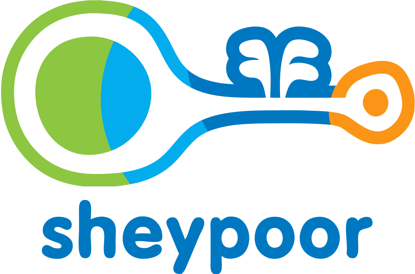 لوگوی شیپور